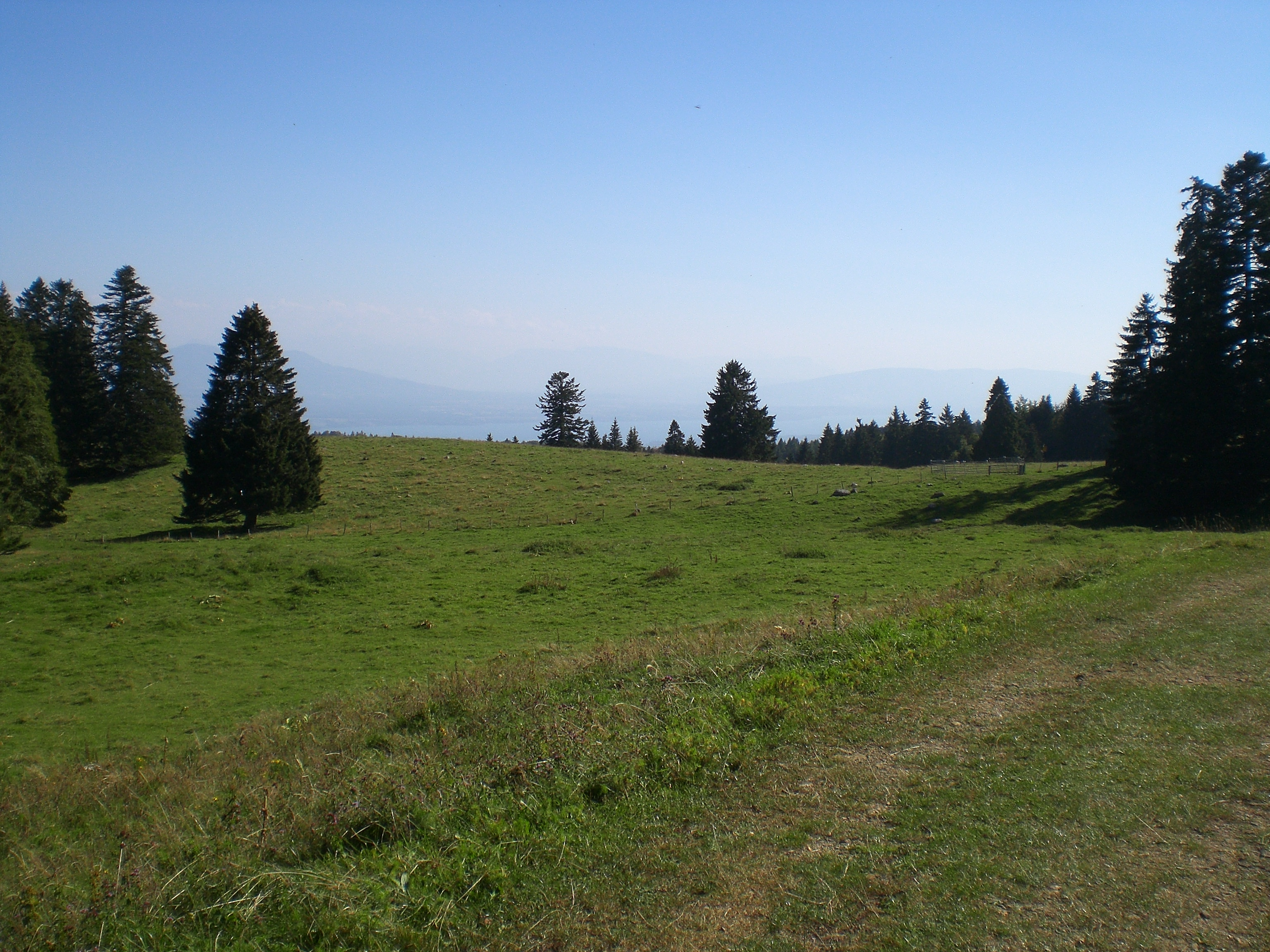 Paysage typique des sommets du Jura